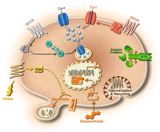 A cell